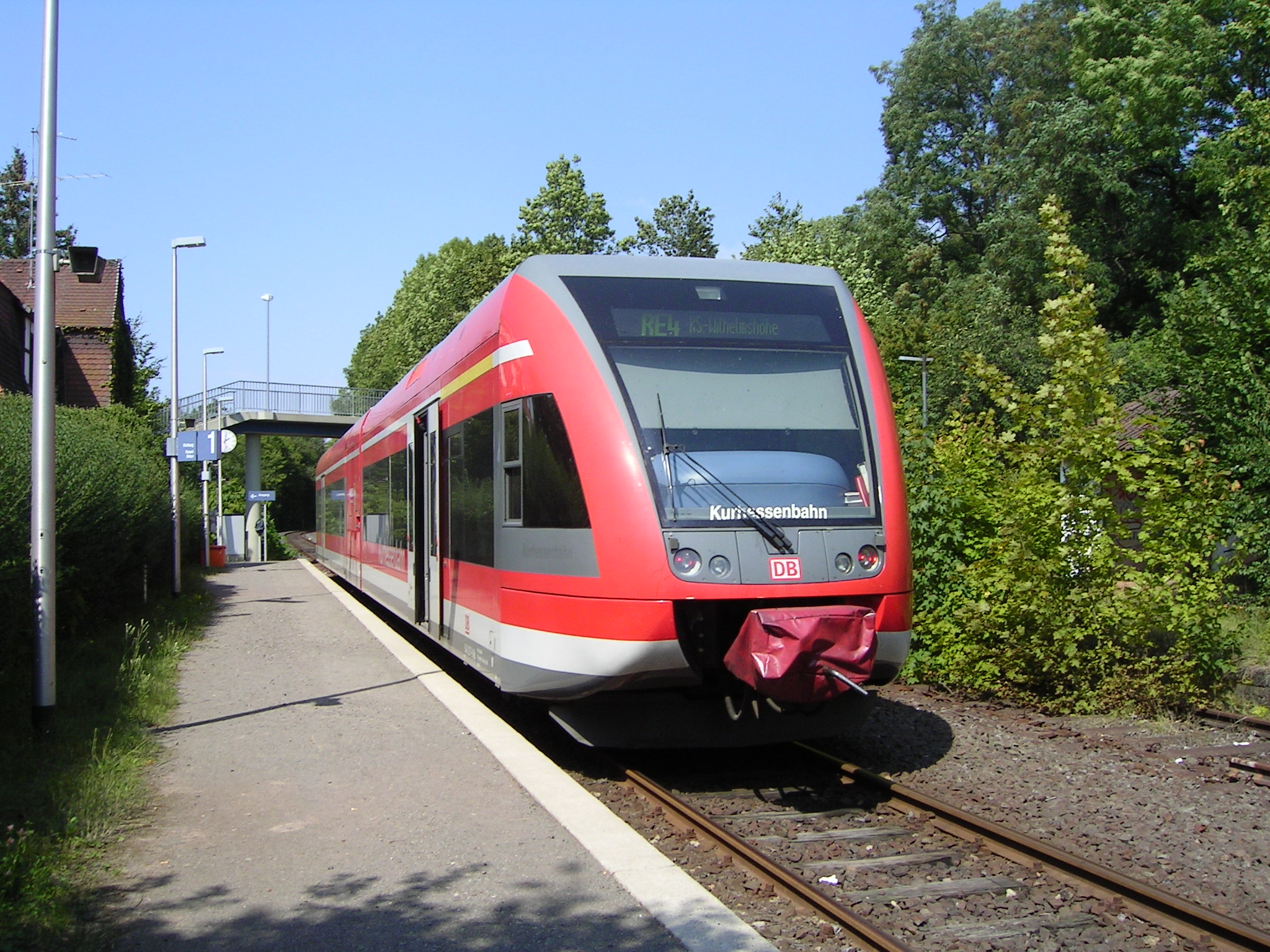 Triebwagen der Kurhessenbahn in Korbach Süd, September 2009